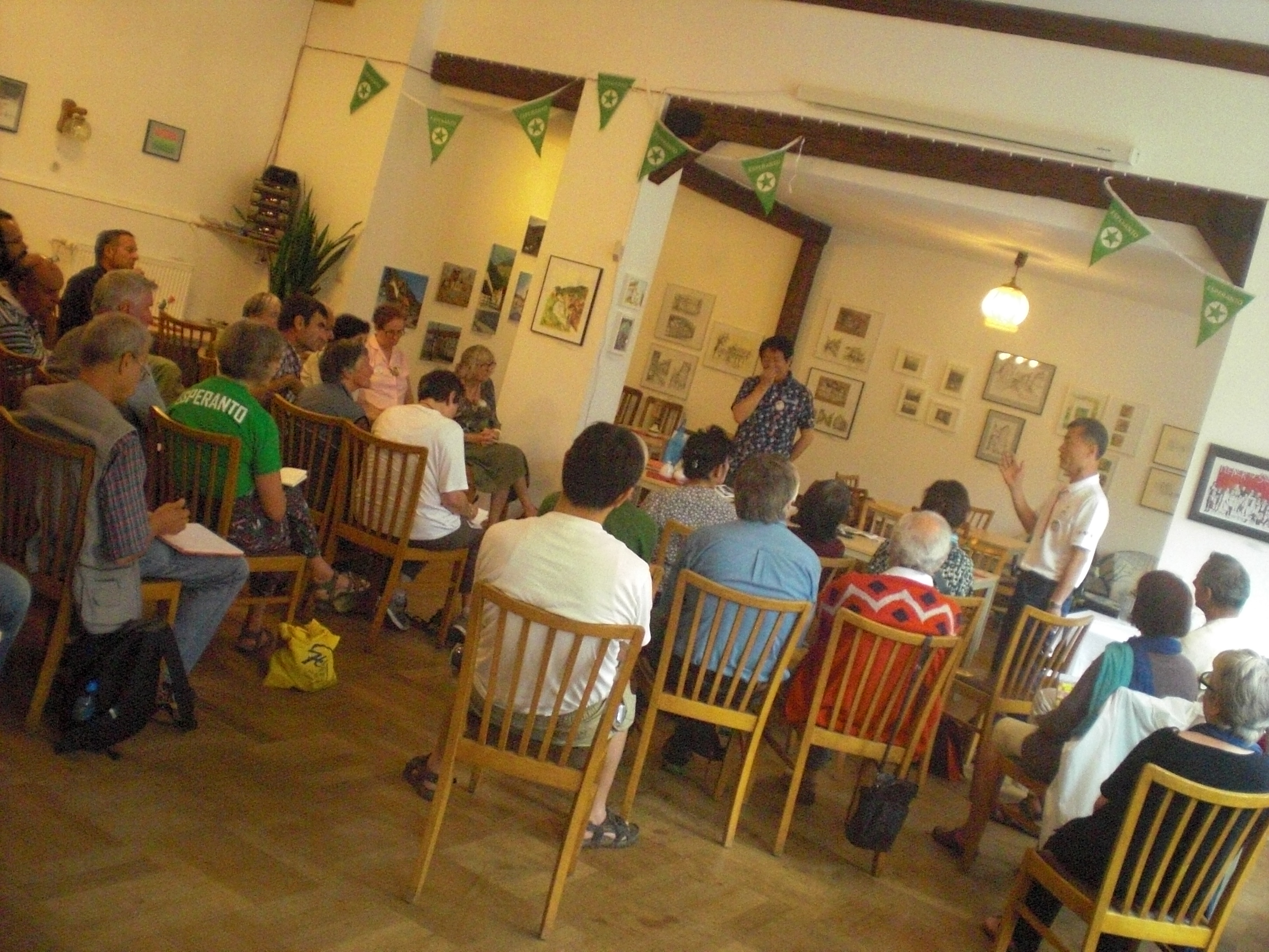 Prelego pri Koreio en Sieber